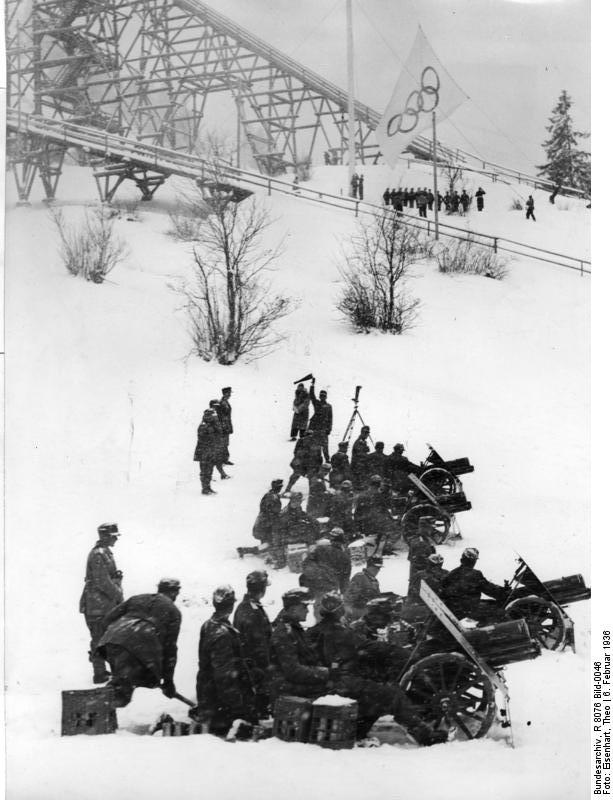 Die deutsche Wehrmacht schiesst Salut zur Eröffnungsfeier der 4. Olympischen Winterspiele. Gapa-110-Garmisch-Partenkirchen - Die Wehrmacht hatte zur Eröffnung zu den 4. Olympischen Winterspielen in Garmisch-Partenkirchen, an der auch Reichskanzler Adolf Hitler teil nahm, vier Geschütze aufgefahren, mit denen sie Salut schoss. Unser Bild zeigt einen Moment während des Salut-Schiessens. Im Hintergrund wird die Olympische Flagge gehisst.